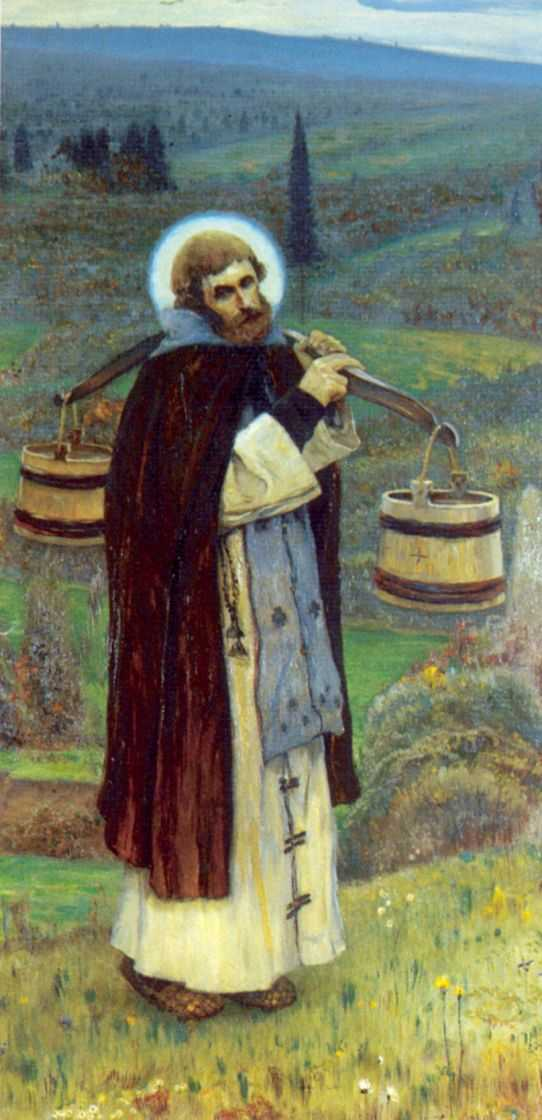 Нестеров Михаил Васильевич. Труды Преподобного Сергия. 1896